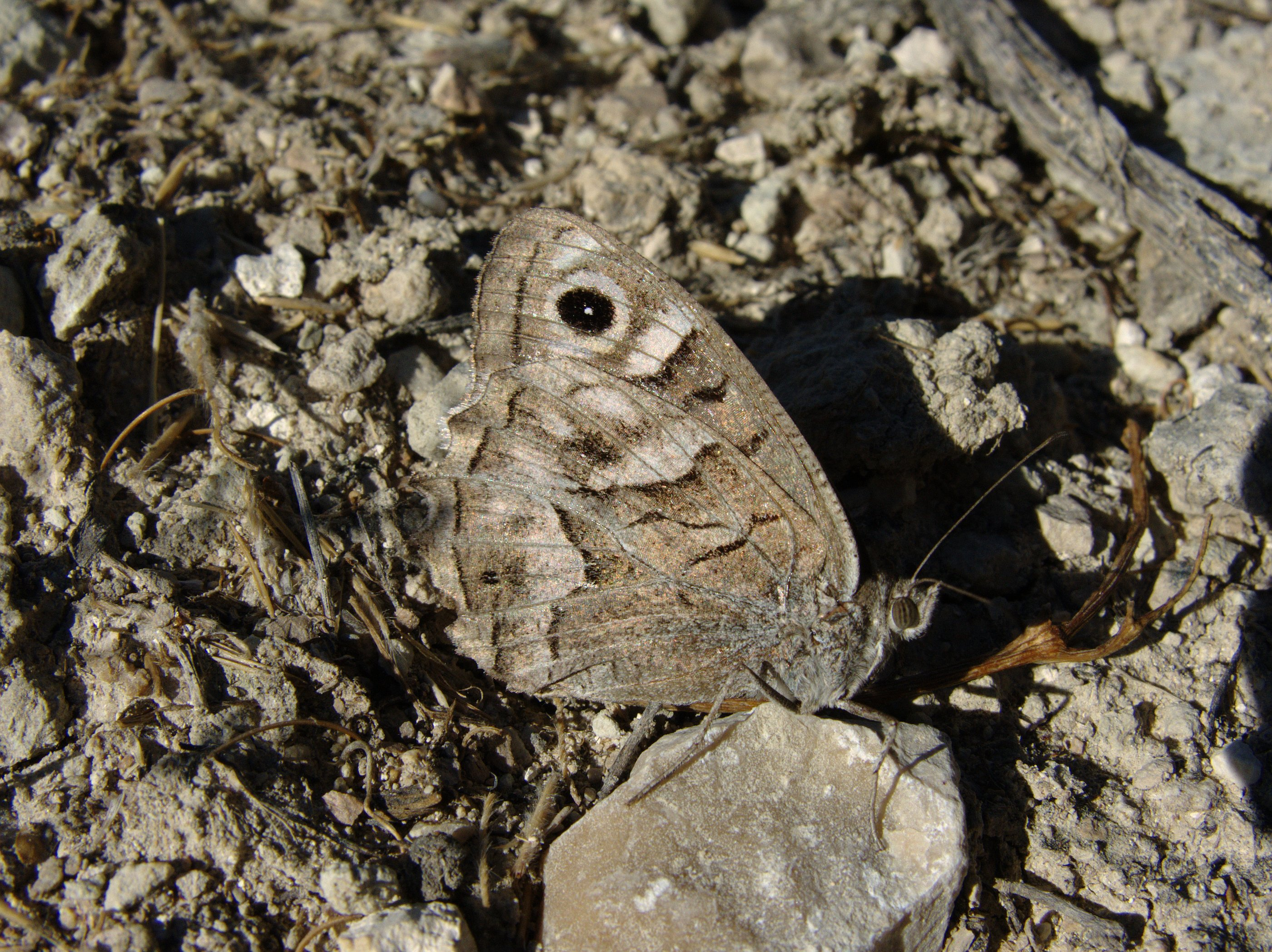 Pseudotergumia fidia (Nymphalidae / Satyrinae). Rivas Vaciamadrid, Madrid, España.